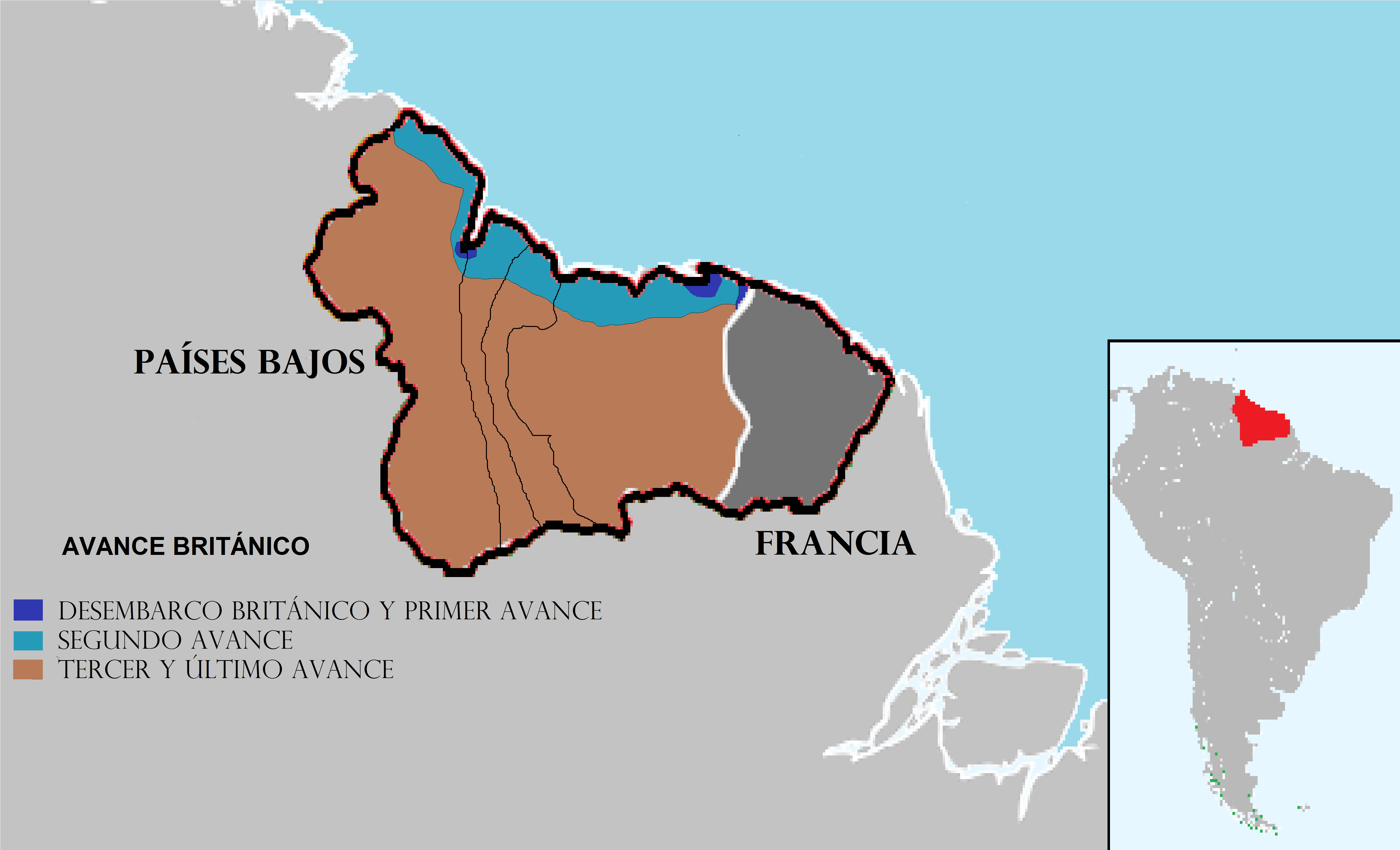 Muestra gráfica de la Batalla de Surinam en las Guayanas de America del Sur.